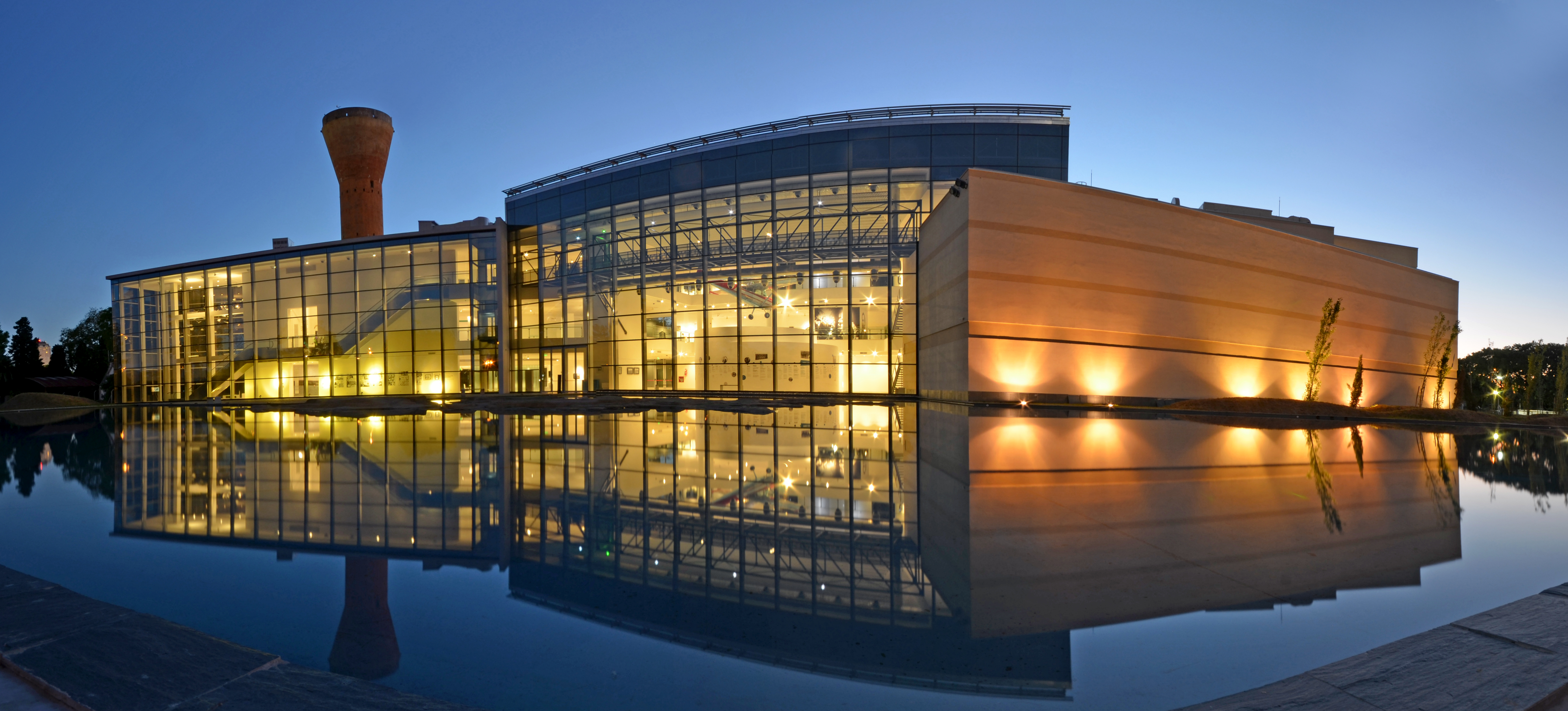 10 de diciembre de 2014.- Museo Malvinas e Islas del Atlántico Sur